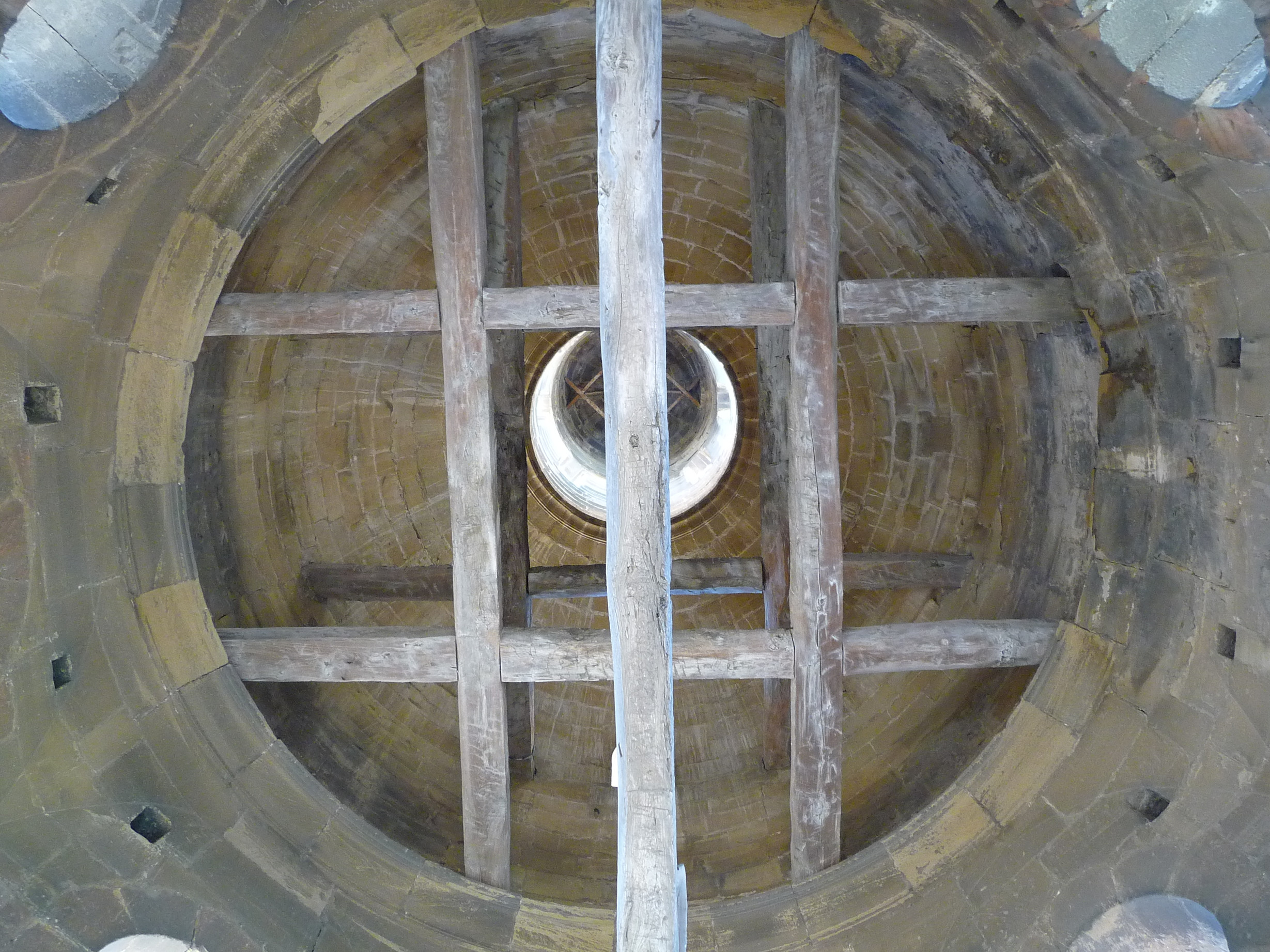 Interior de la torre de la Iglesia de Santo Tomás de Haro vista desde el campanario.